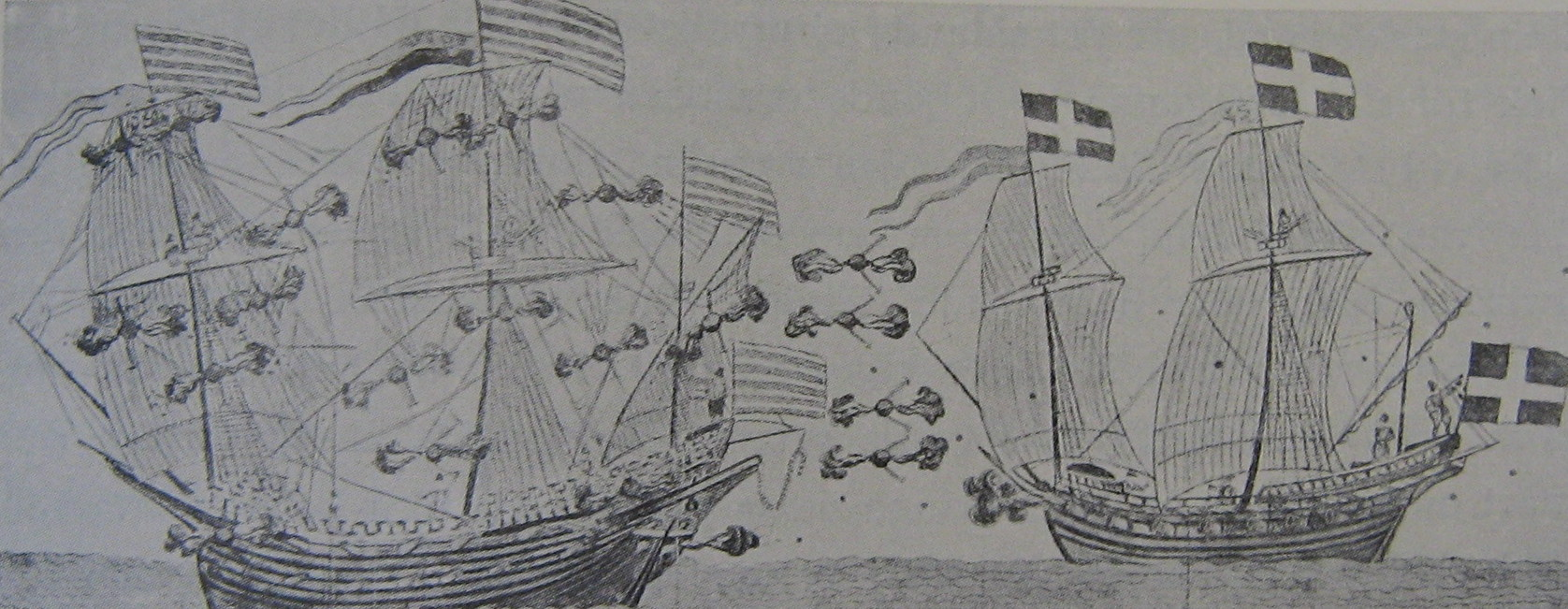 Striden mellan de danska och svenska amiralsfartygen Jägmästaren och Sankt Erik, utförd av den danske tygmästaren Rudolf van Deventer i Det Kongelige Bibliotek. Okänt år, 1500-talet, striden utspelades 1565.